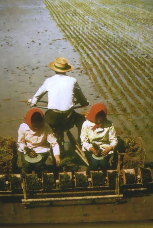 Arbeit auf einem Reisfeld in Nordkorea 1989